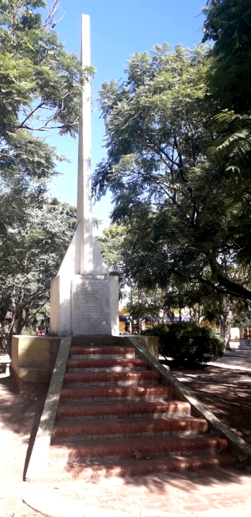 Plazoleta central San Martín